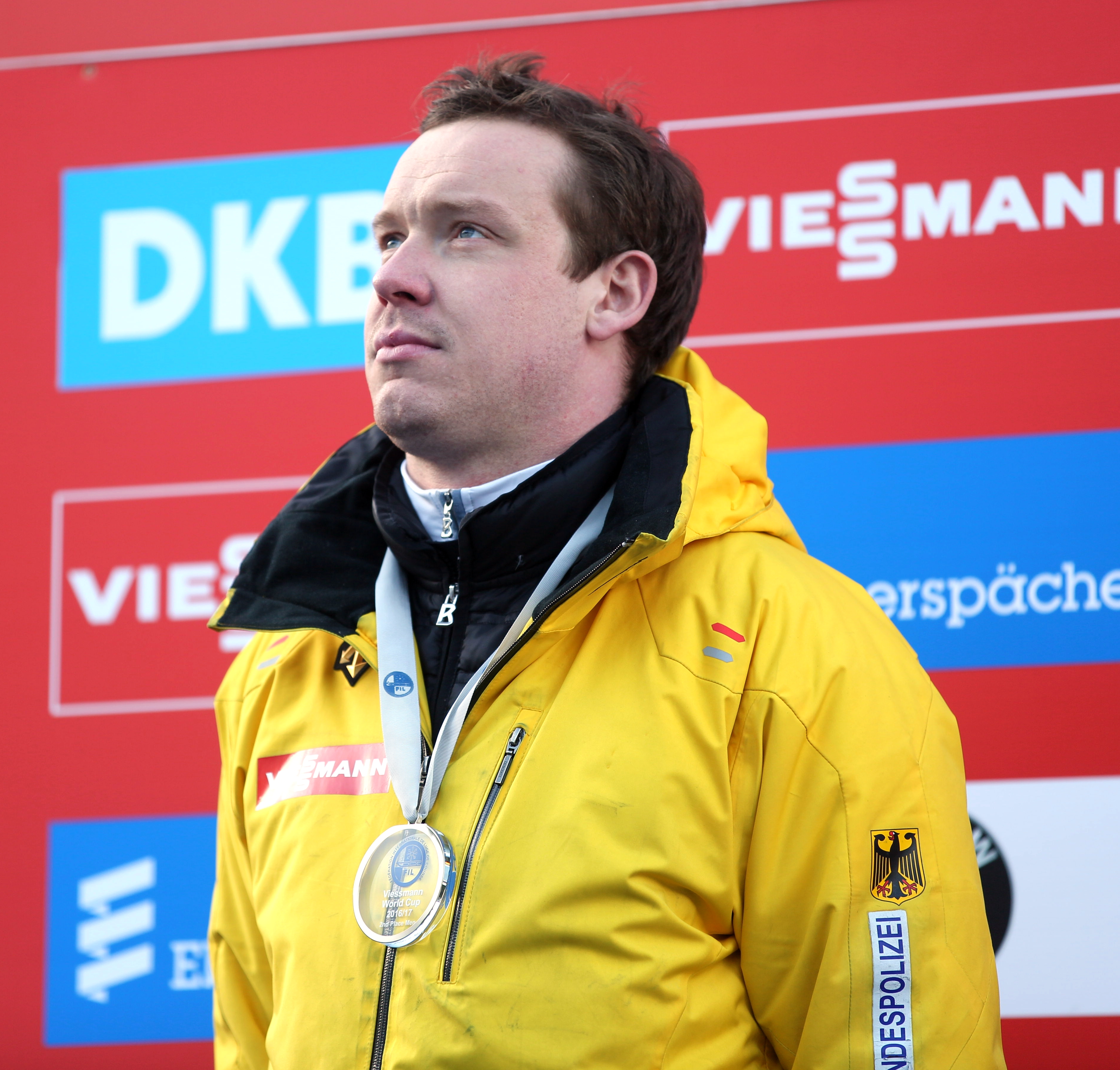 Felix Loch bei der Siegerehrunng in Altenberg 2017